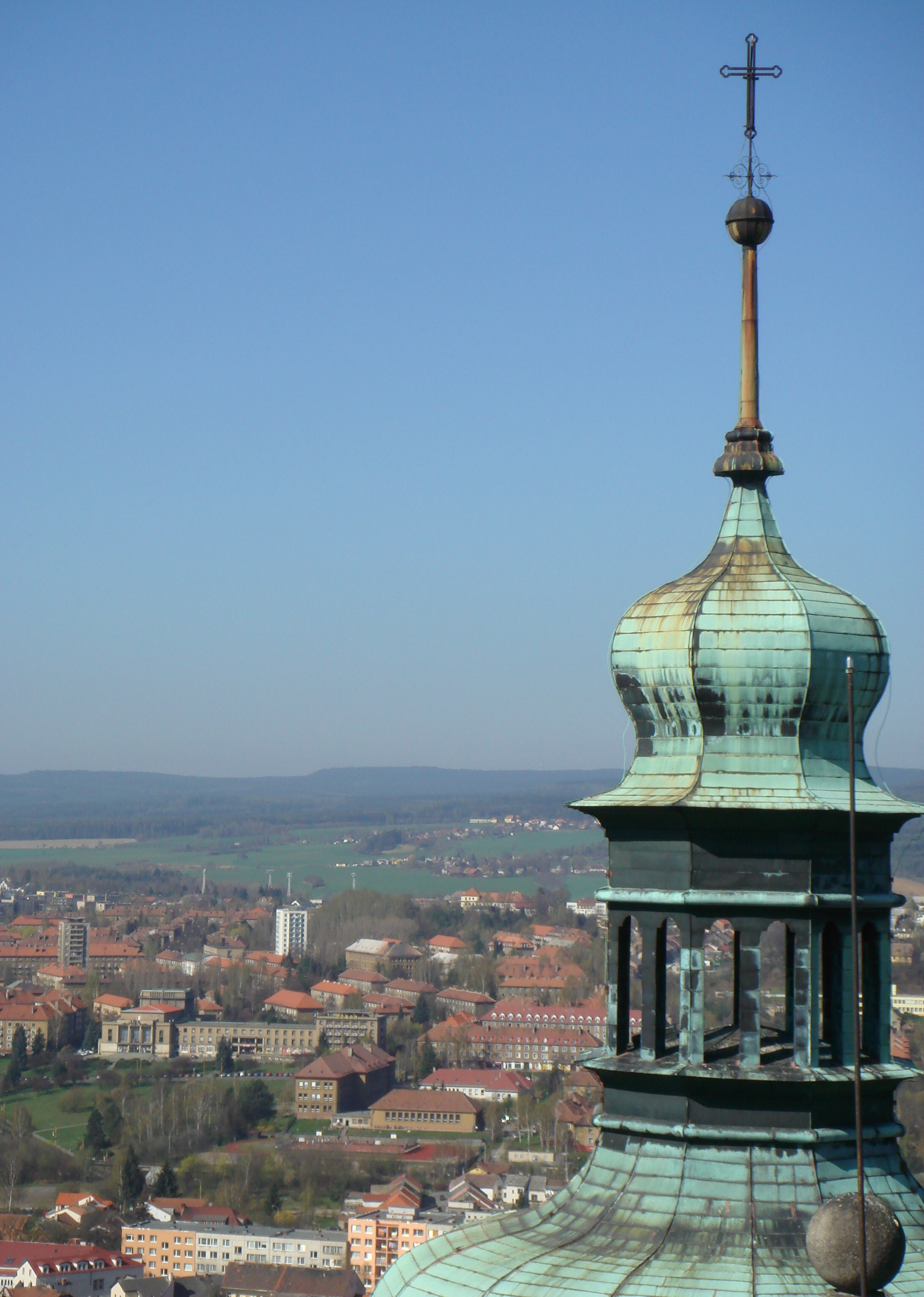 pohled z věže na Příbram (konkr. Gymnázium)